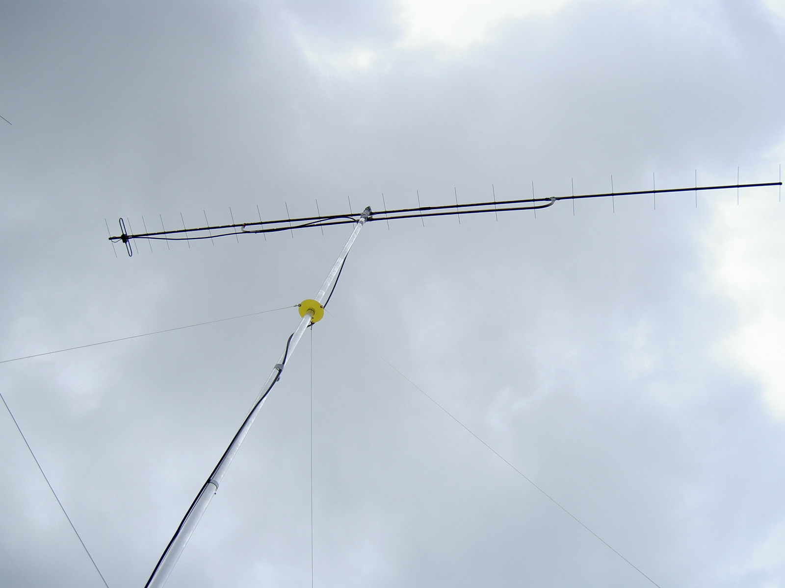 Lang-Yagi-Uda-Antenne für das 70cm Band